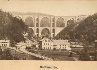 Gaststätte und Bahnhof Barthmühle vor der Elstertalbrücke in einer Ansichtskarte aus der Zeit des Ersten Weltkrieges